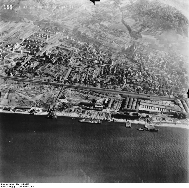 Rheinbefliegung der Alliierten 1953